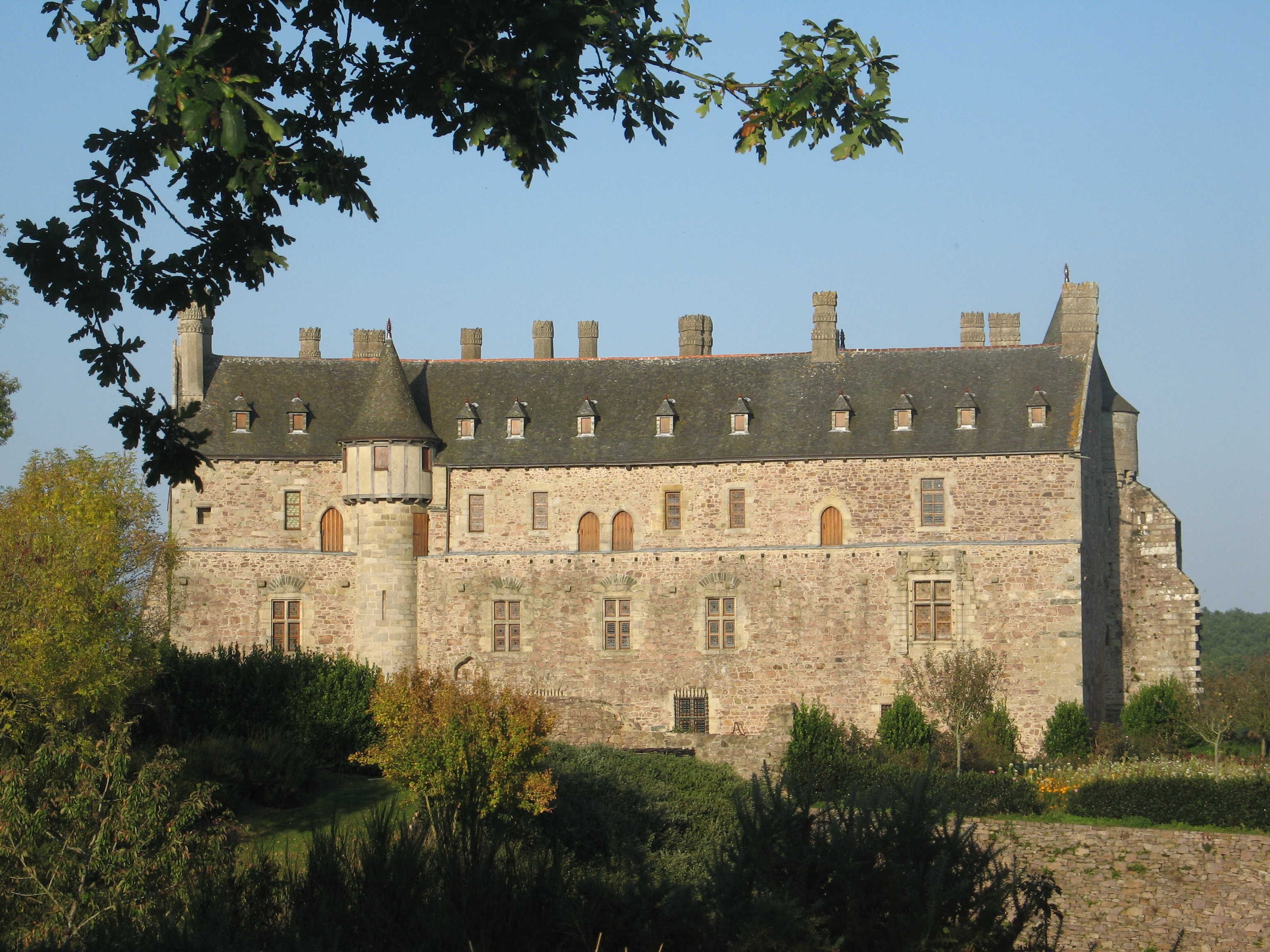 Chateau de la Roche Jagu, Côte d'Armor, France